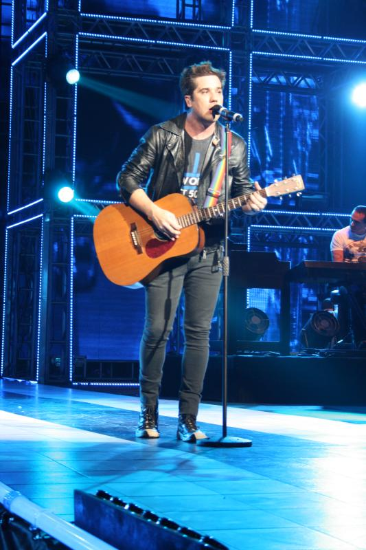 Jota Quest no Via Funchal em 2010.